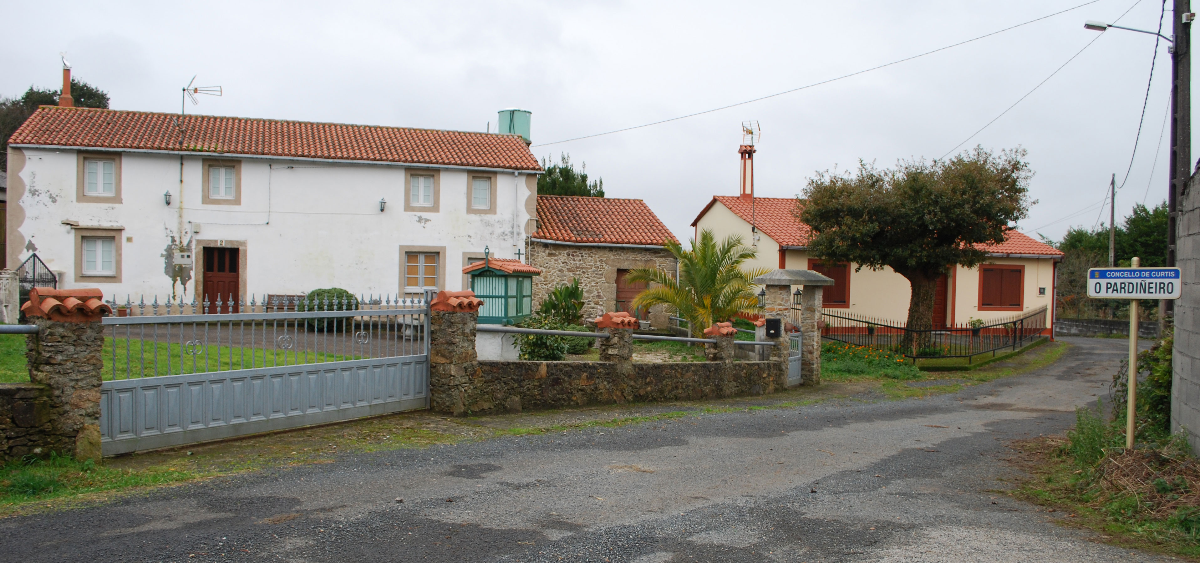 Vista en O Pardiñeiro Fisteus Curtis A Coruña Galiza Spain